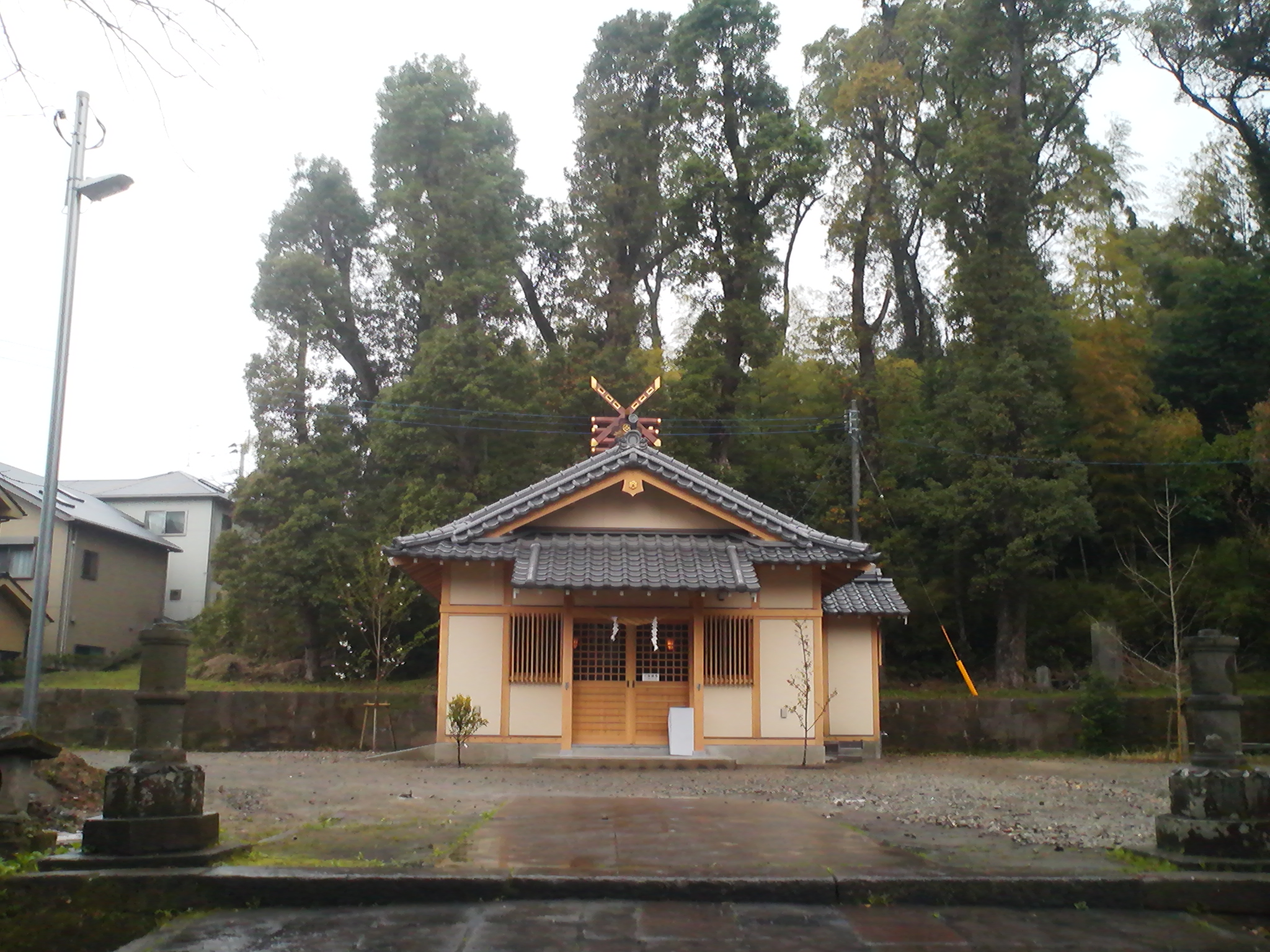 鹿児島県鹿児島市にある南方神社の外観。